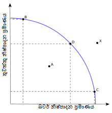 සිංහල: නි.හැ.මා වක්‍රය මගින් විස්තර කරන ලද ලක්ෂය